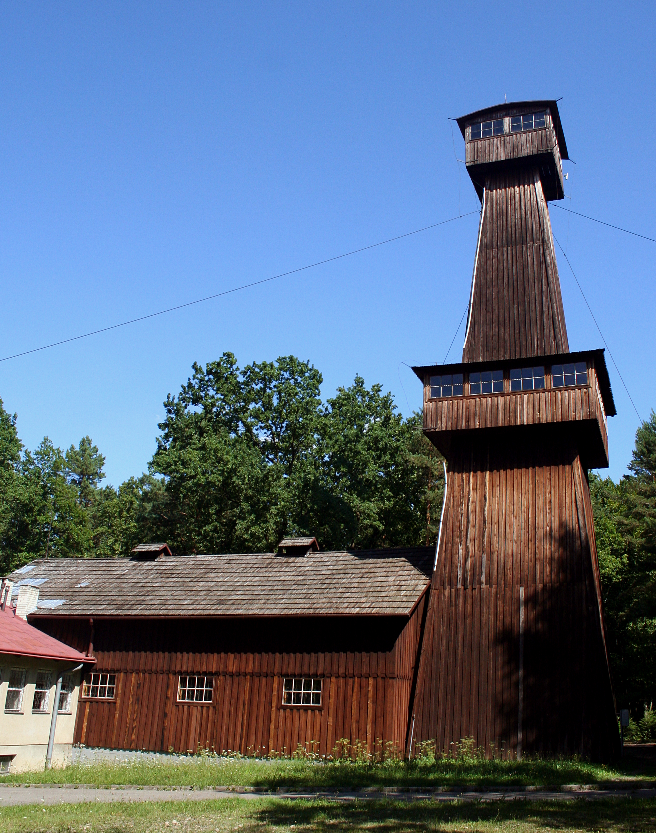 Skansen w Bóbrce - wiertnica polsko-kanadyjska